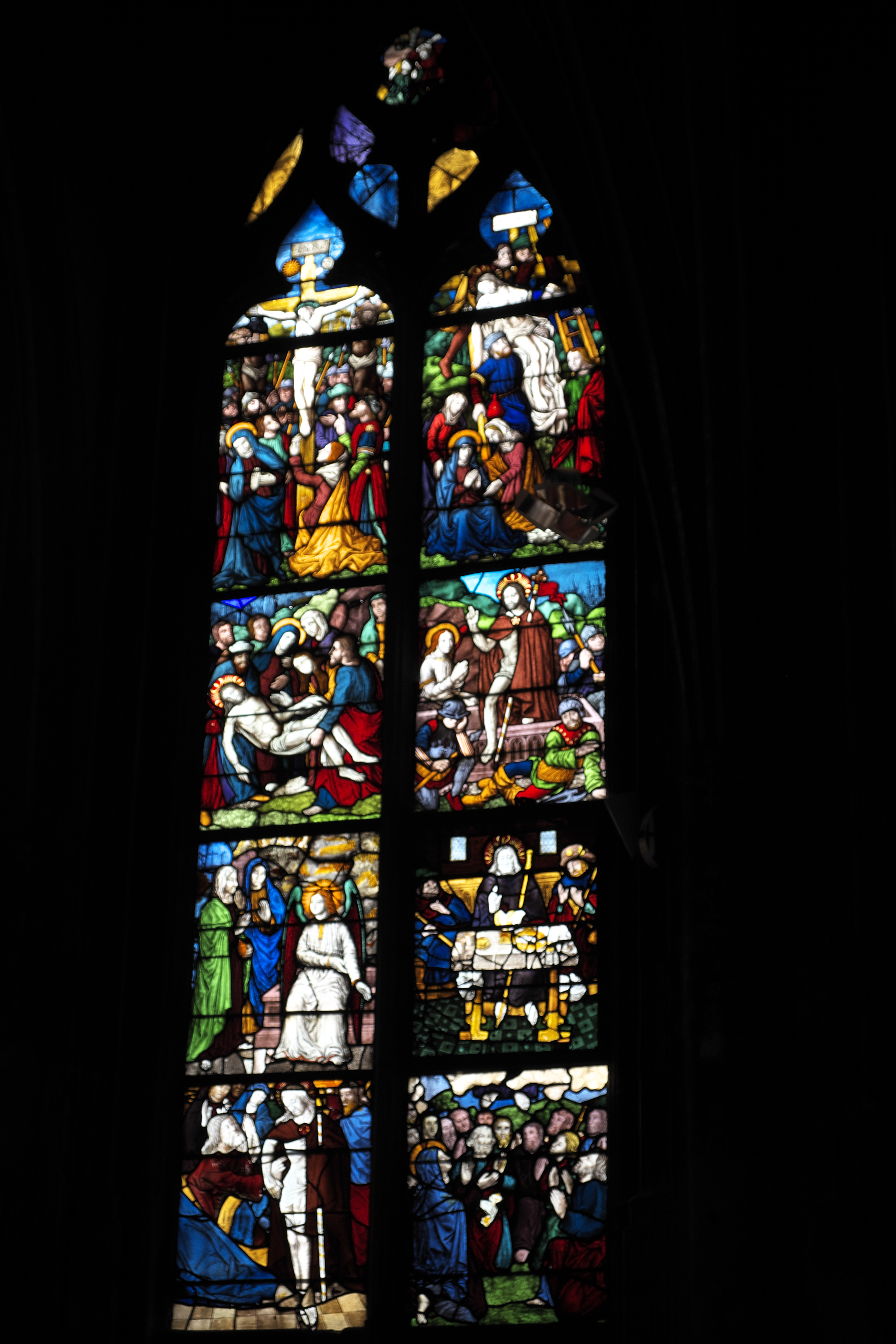 Katholische Kirche Saint-Pierre in Dreux im Département Eure-et-Loir (Centre-Val de Loire/Frankreich), Bleiglasfenster (baie 4) aus dem frühen 16. Jahrhundert im Chor; Darstellung: Tod und Auferstehung Christi